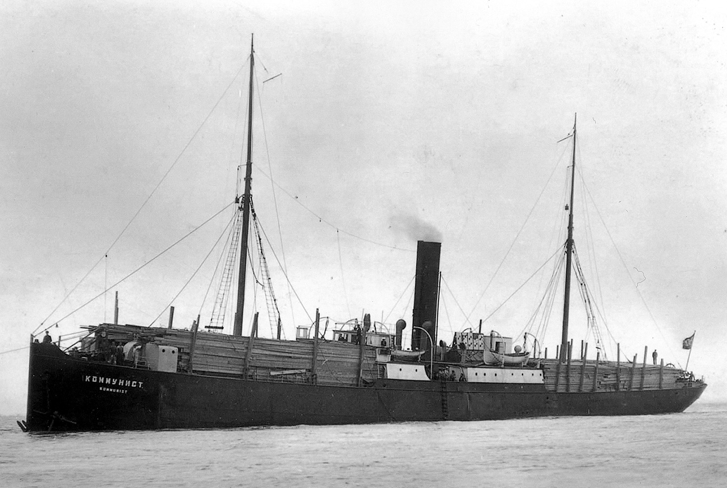 Пароход «Коммунист